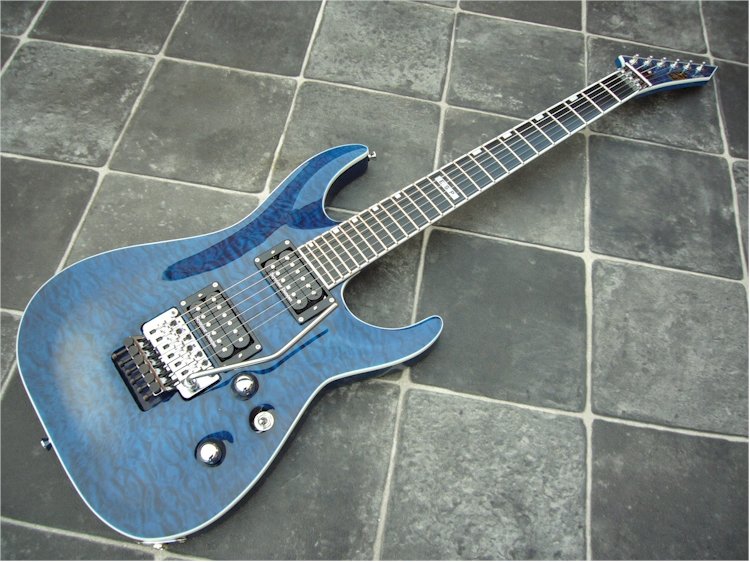 ESP Horizon FR-II